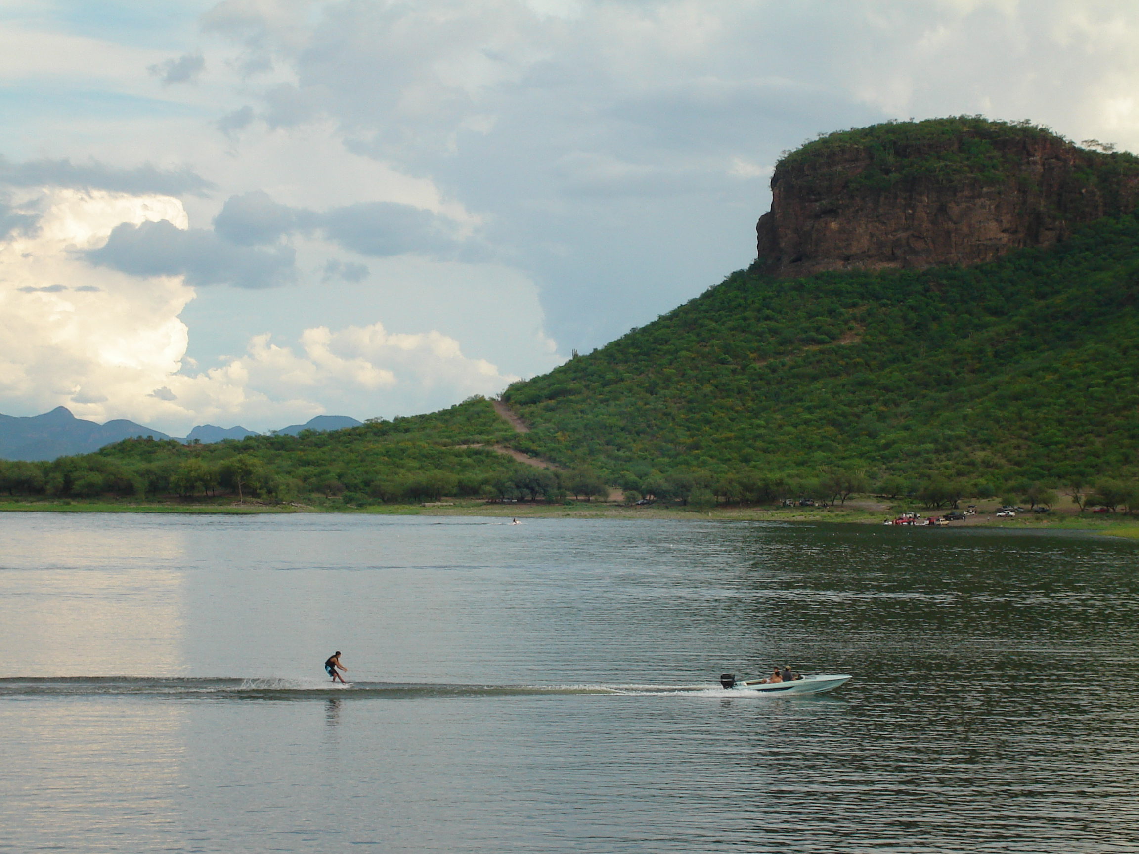 Deportes acuáticos en el Dique Diez